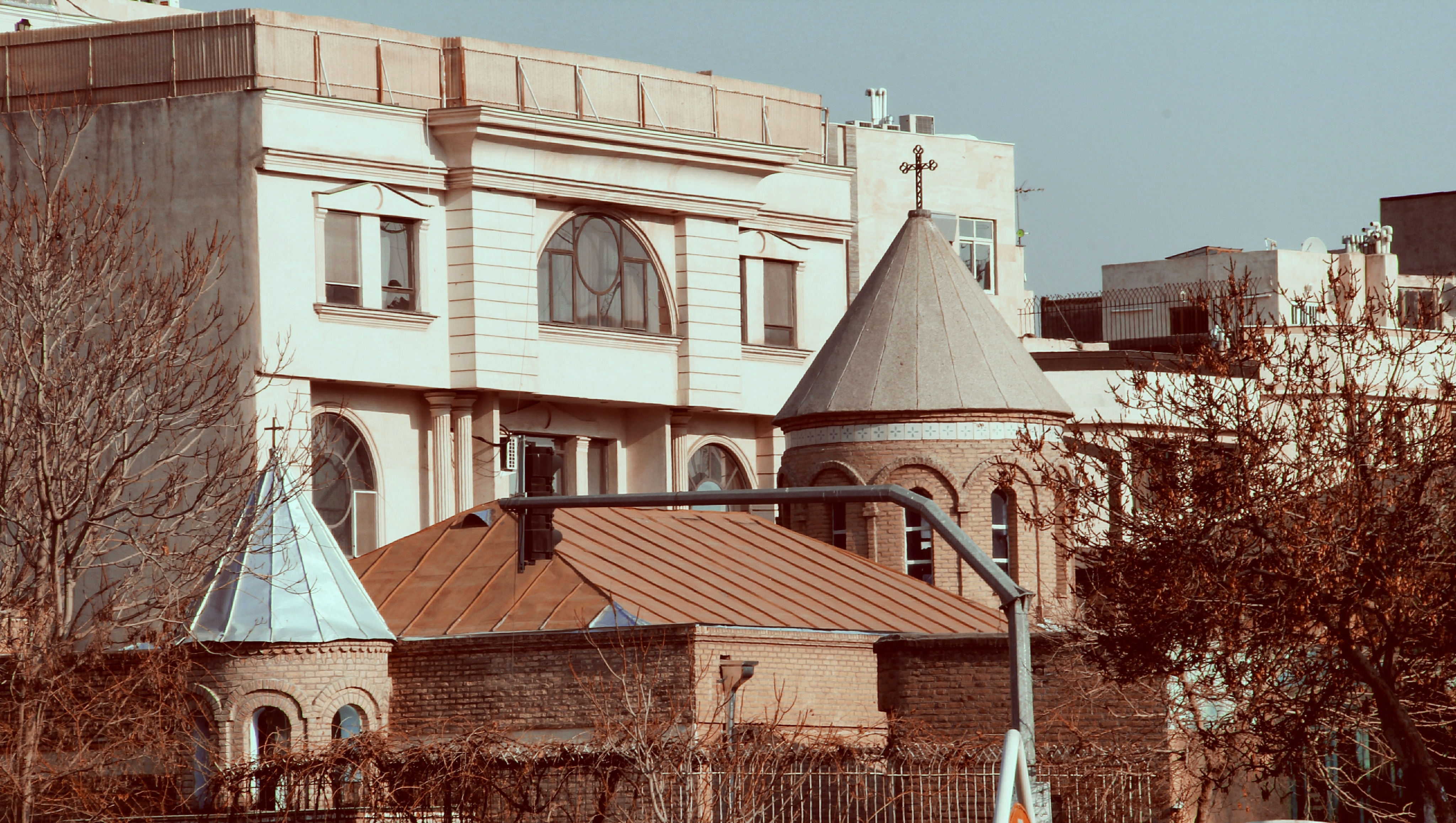 کلیسای مخروبه